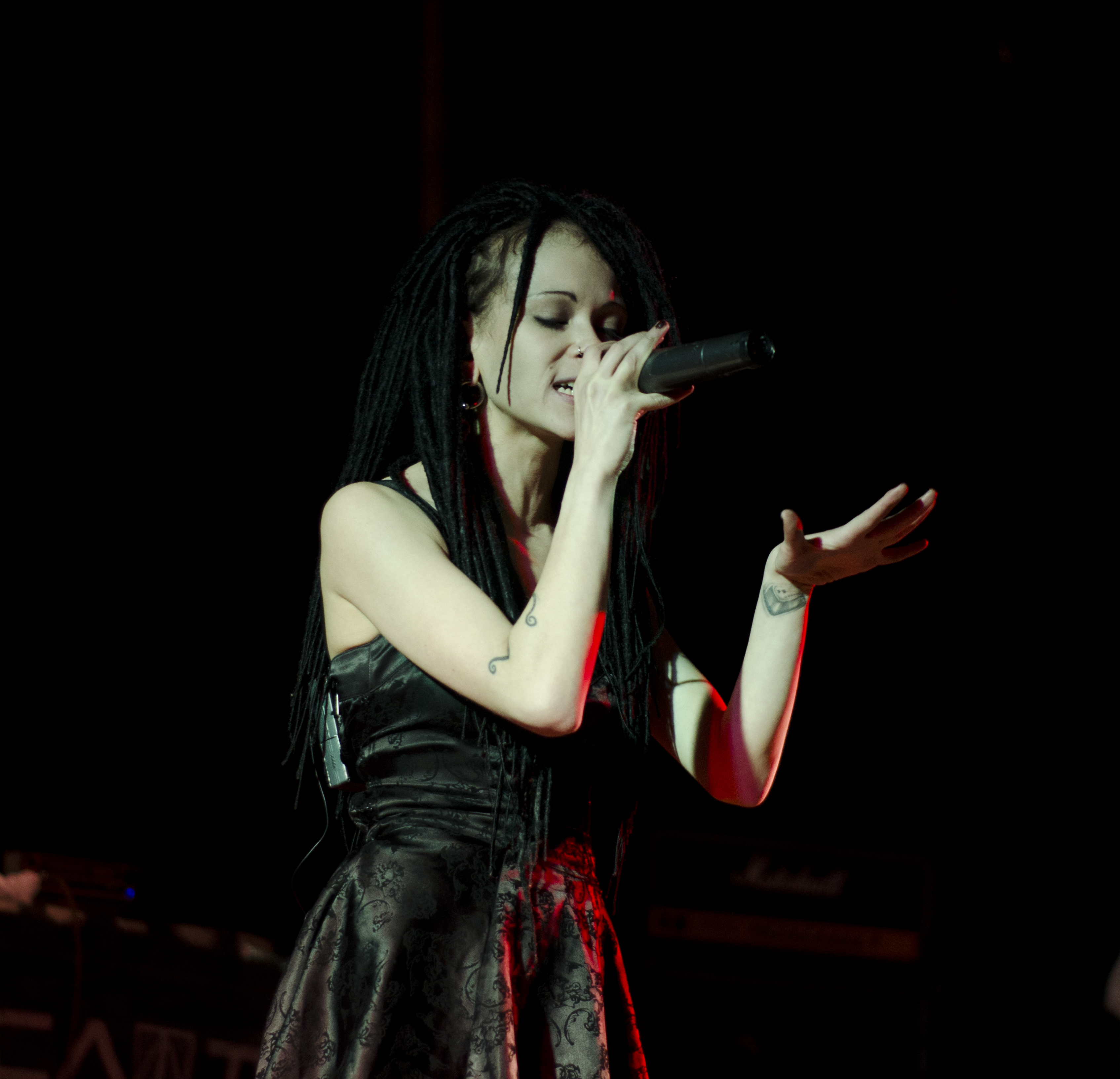 Nookie. Slot. By Dmitry Galkin.